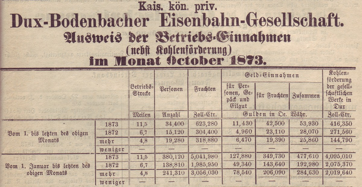 Bekanntmachung der Betriebseinnahmen der Dux-Bodenbacher Eisenbahn-Gesellschaft in der Leipziger Zeitung vom 8. November 1873